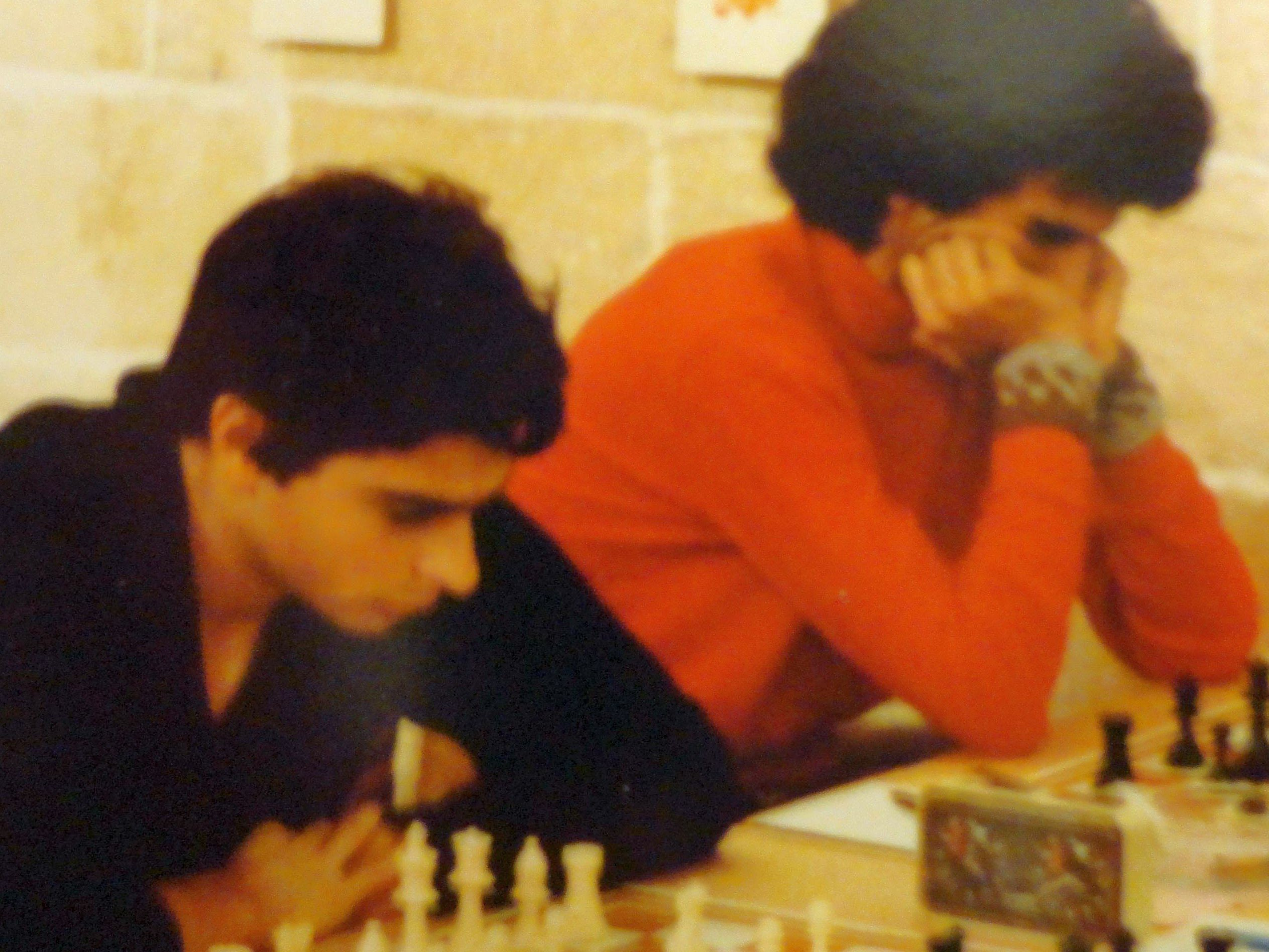 Beat Züger und Giancarlo Franzoni, Schacholympiade 1980 in Valletta auf Malta.